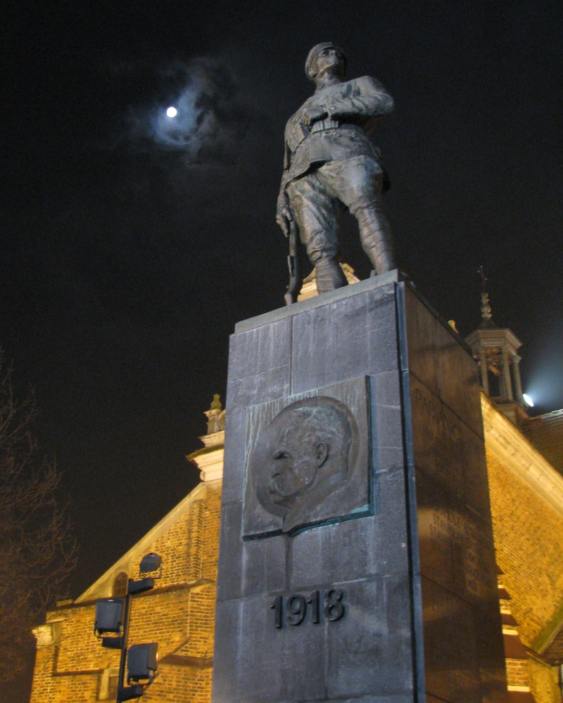 Pomnik w Pabianicach.